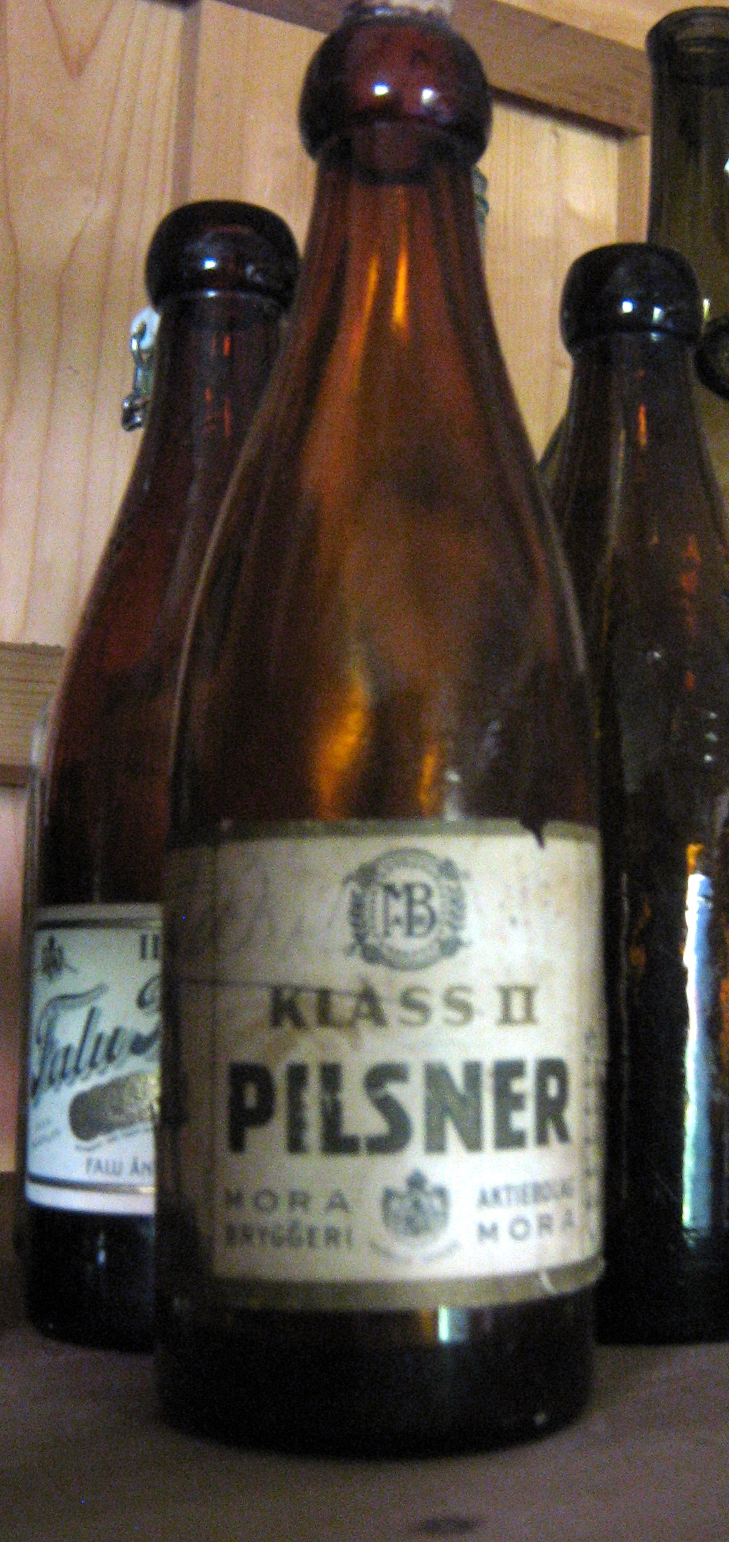 Pilsnerflaska från Mora bryggeri, 1929-32.